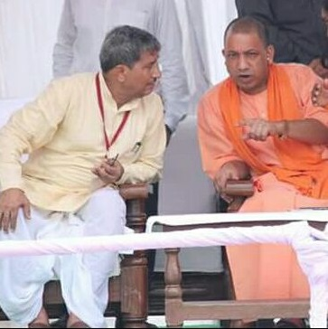 श्री मुकुट बिहारी वर्मा जी, माननीय मुख्यमंत्री जी के साथ